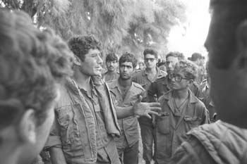 הצנחלאים – גדוד נח"ל מוצנח 50. הלוחמים לאחר קרב הגבורה ברמת הגולן מסביב למג"ד, רס"ן יורם יאיר, (יה יה).